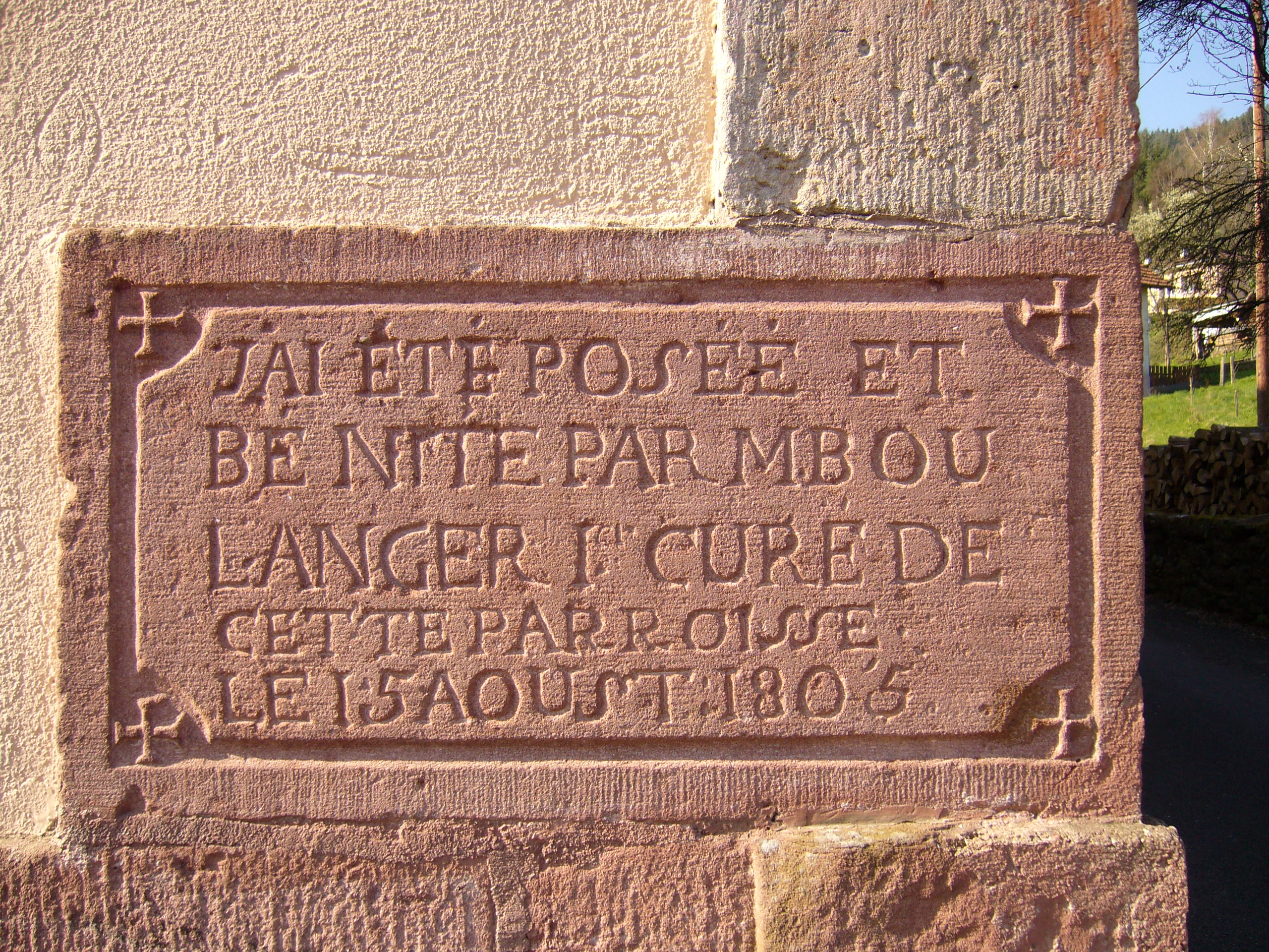 Pierre angulaire encastrée dans le mur de l'église Sainte Rosalie